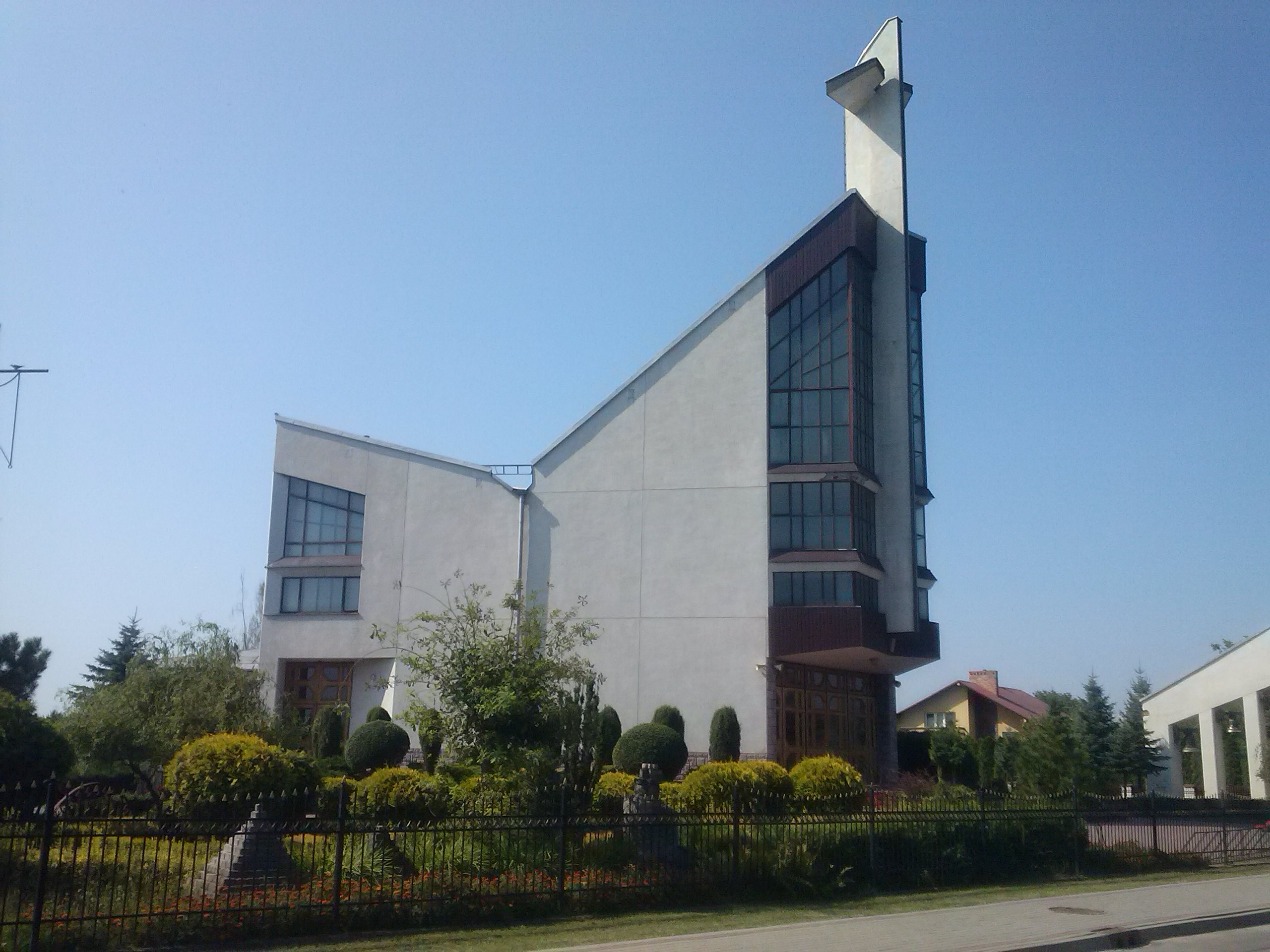 Kościół parafialny pw. św. Andrzeja Apostoła w Chałupkach Dębniańskich